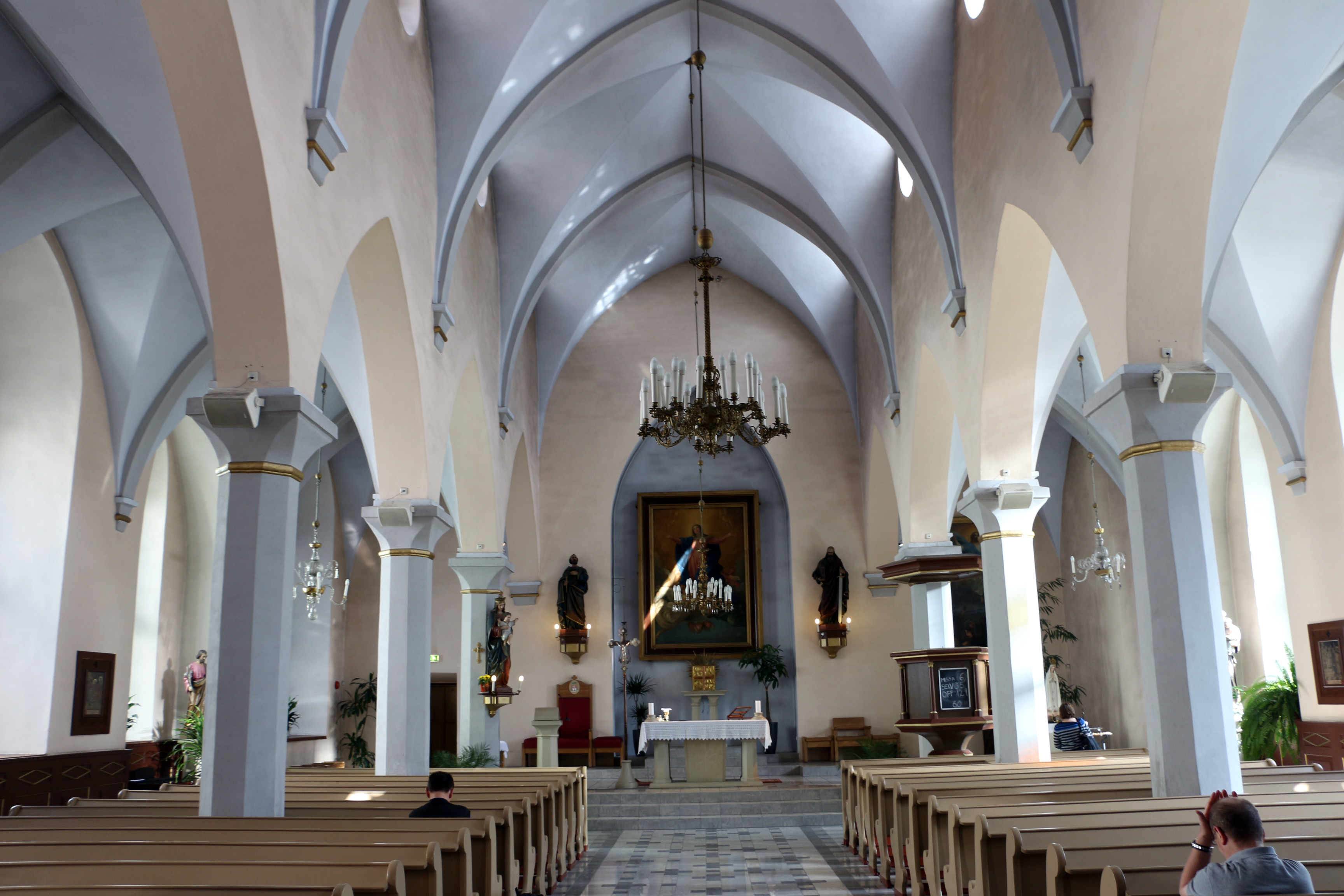 Church of St. Peter and St. Paul in Tallinn